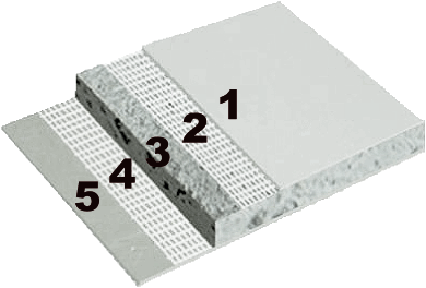 Zloženie MgO dosky